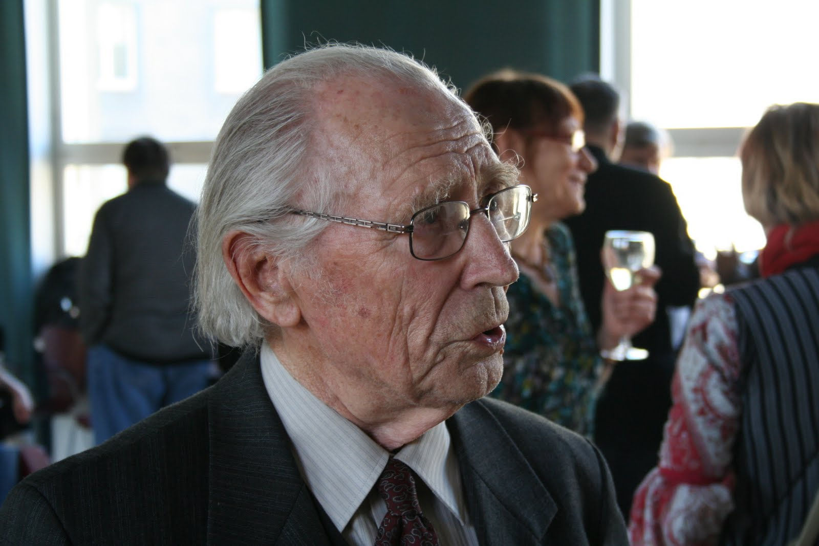 Harri Jõgisalu Eesti Kirjanike Liidu üldkogul 2011. aastal.